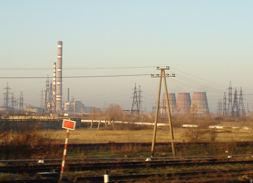 Балаковская ТЭЦ